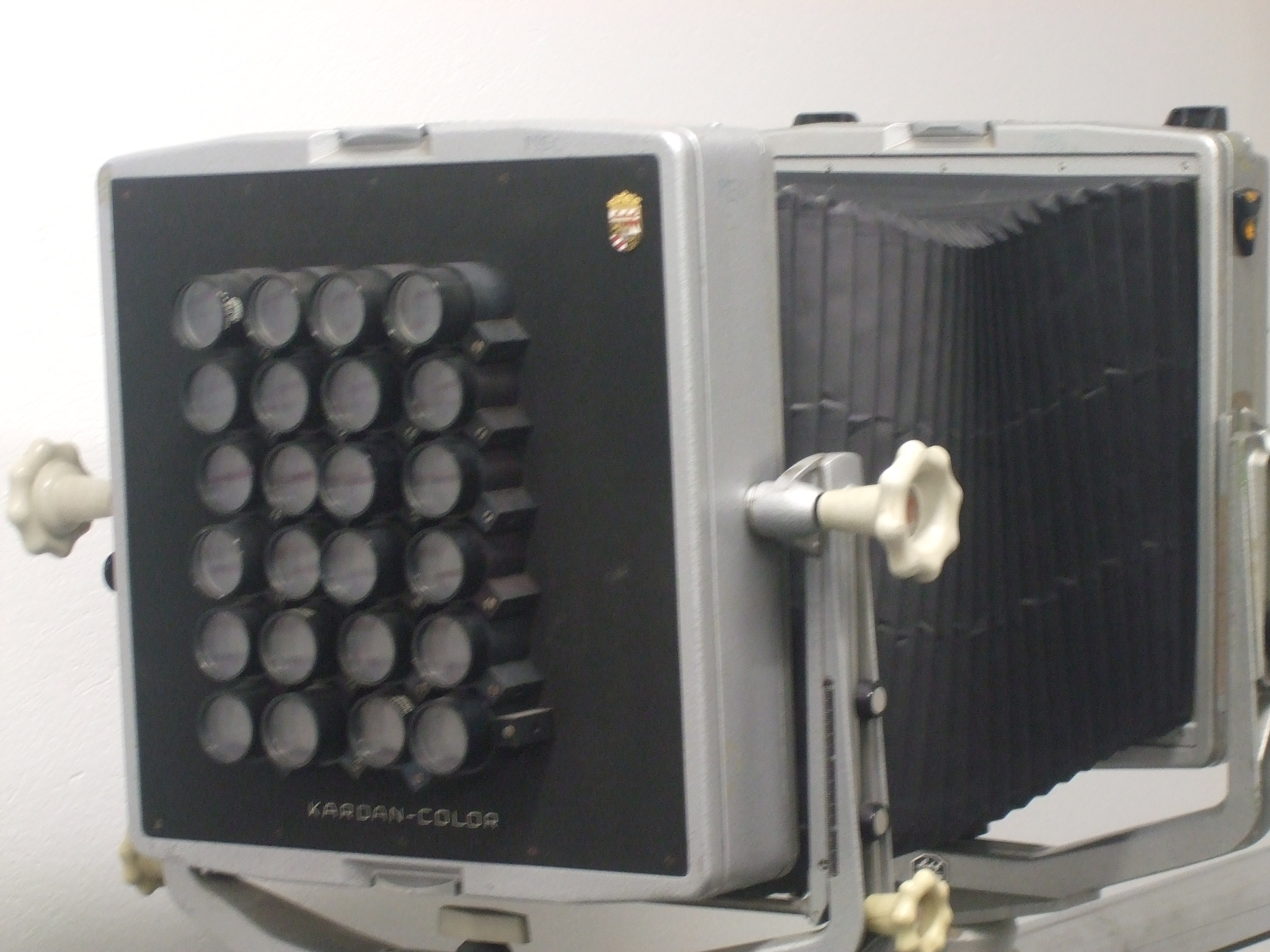 Kamera mit 24 Objektiven - Cranz-Schardin-Verfahren